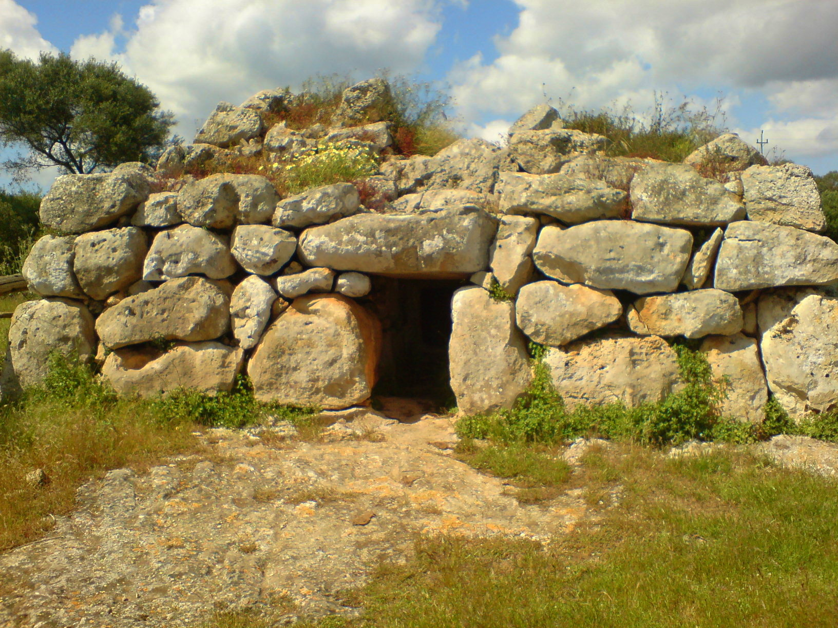 Naveta septentrional de Rafal Rubí, Alaior, Menorca